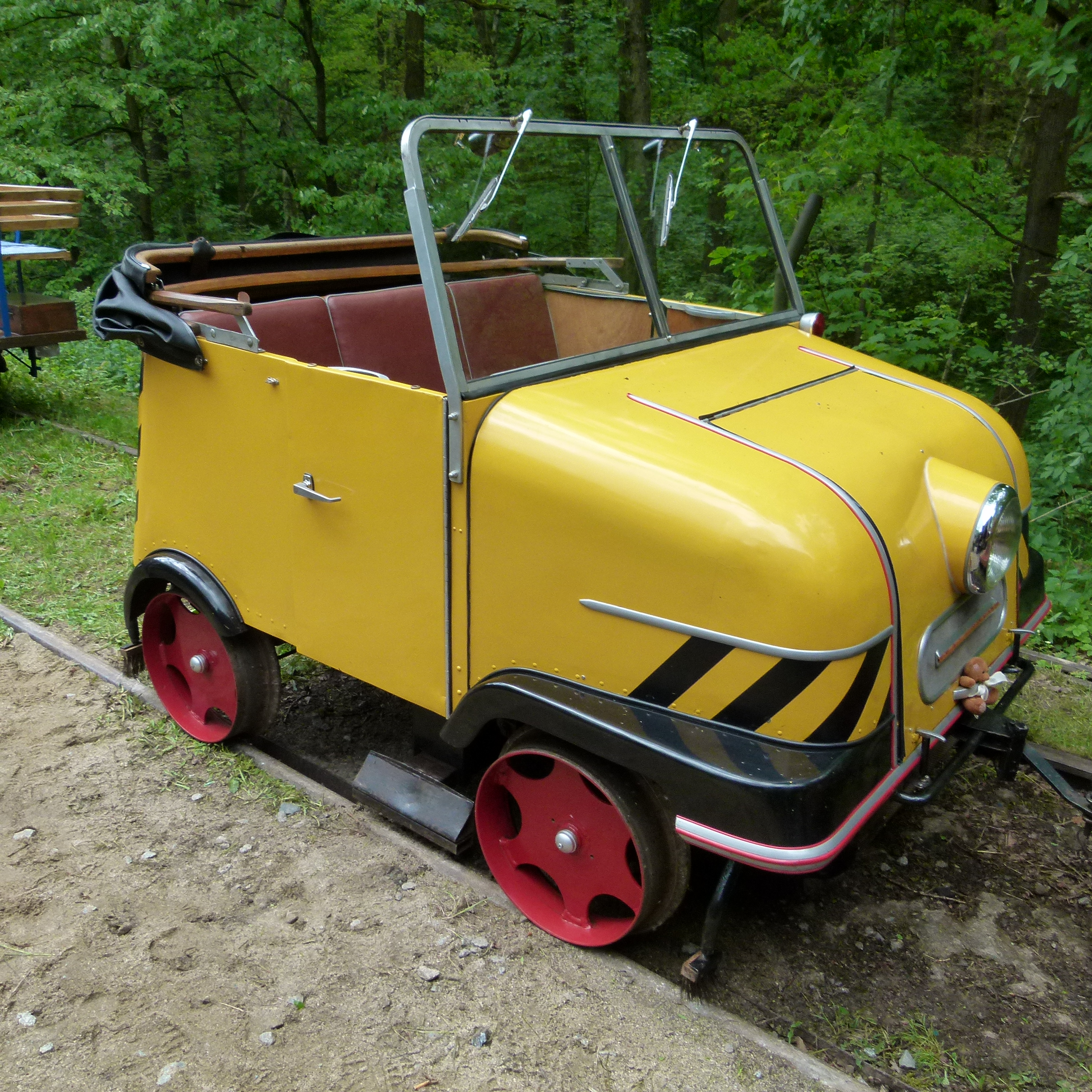 Denkmalgeschütztes Feldbahnmuseum Herrenleite, Lohmen